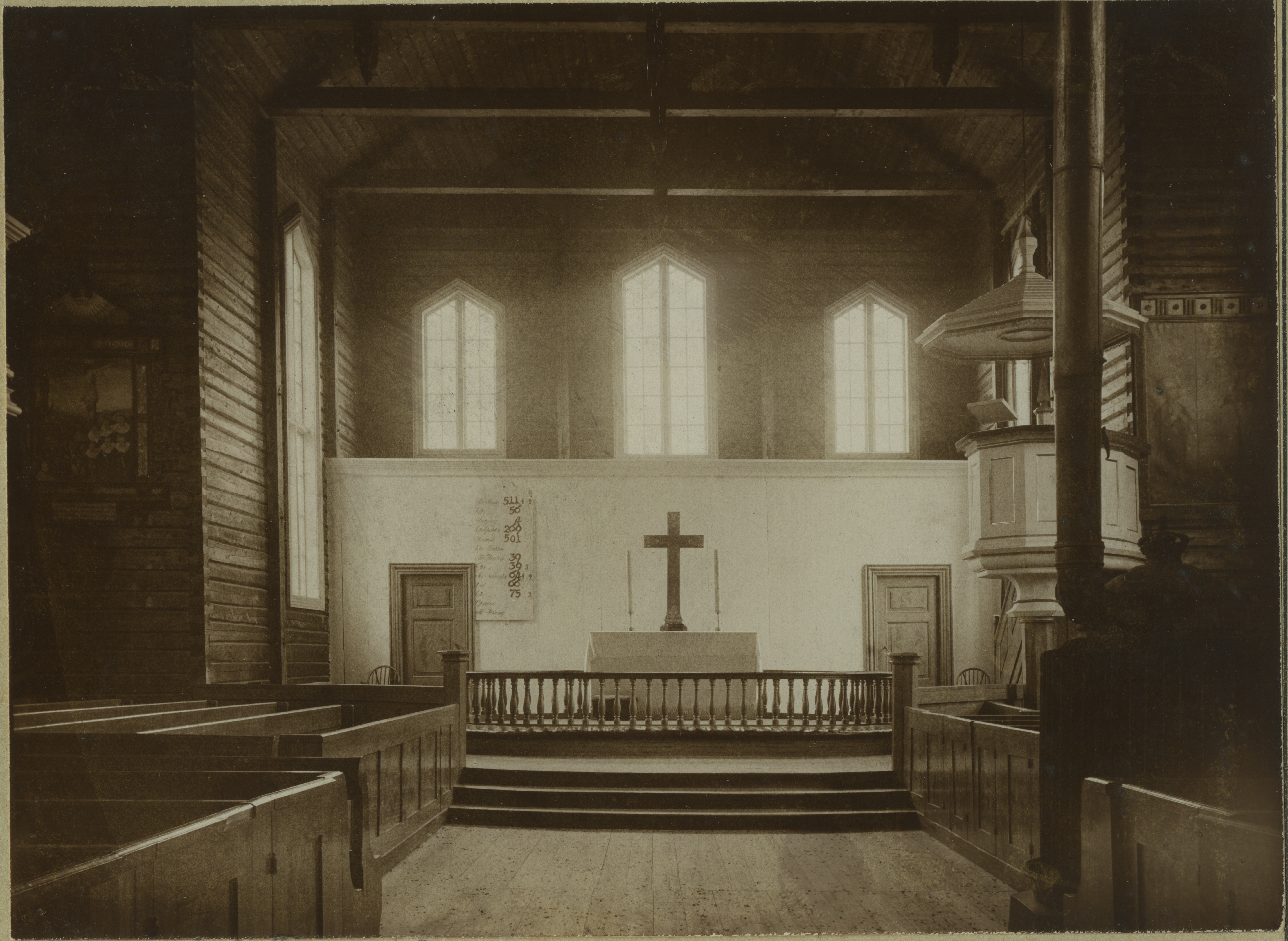 Åsen kirke ble vigslet i 1858 og brant ned til grunnen julenatta 1902. Dette interiørbildet er trolig tatt få år før brannen. Til venstre for koråpningen er ei minnetavle – et epitafium – fra 1600-tallet, som fulgte med fra Vang kirke. Det var gitt til kirka av Oluf Larssen i Trondheim. På høyre side av koråpningen, bak prekestolen, er den gamle altertavla fra Vang kirke. Fotograf / Photographer: C. Christensen Thomhav Fotoeier / Photo owner: Åsen Museum og Historielag Digitalisering / Digitizing: Arne Langås Foto-ID / Photo ID: 061-0008